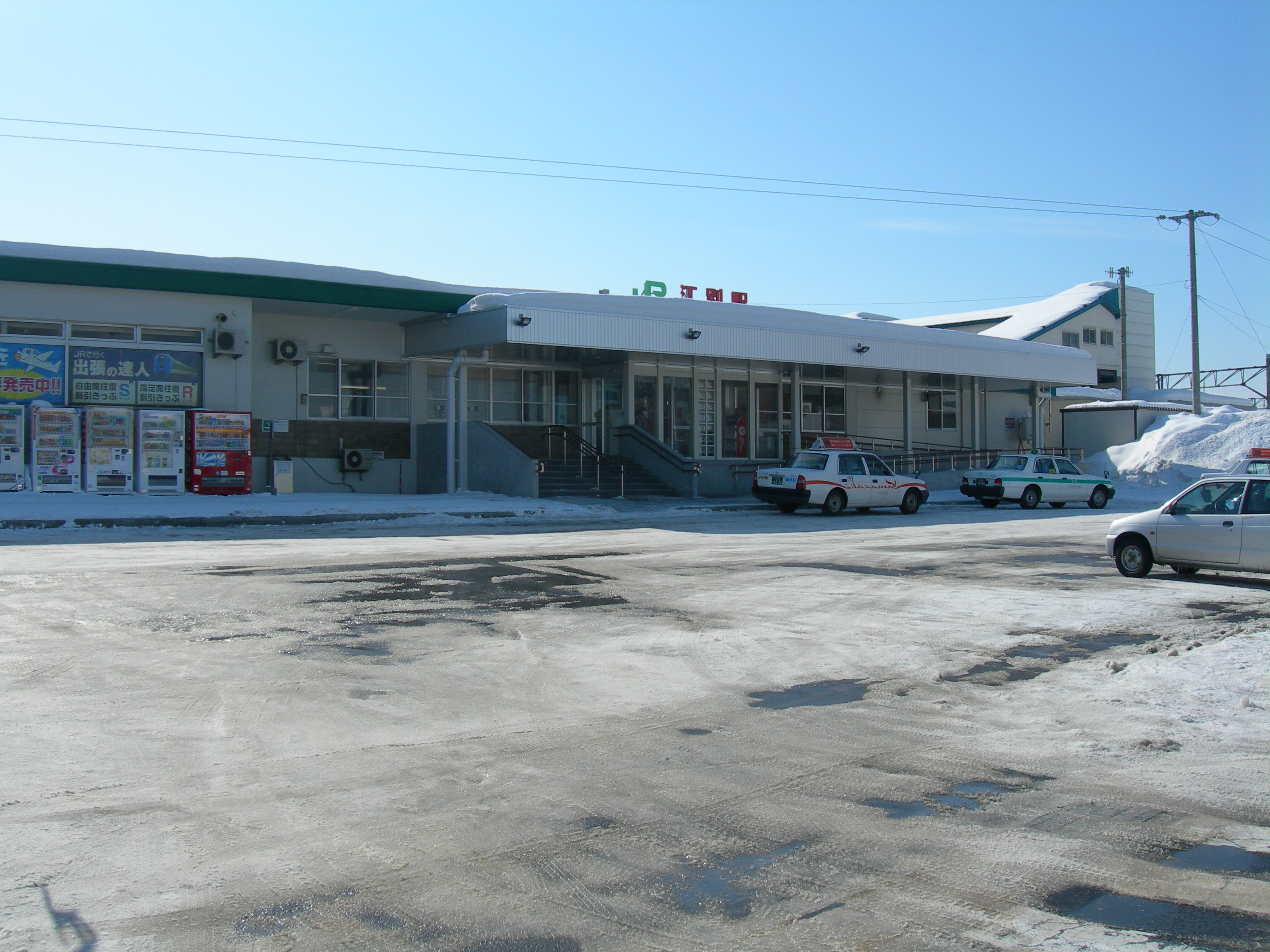 江別駅